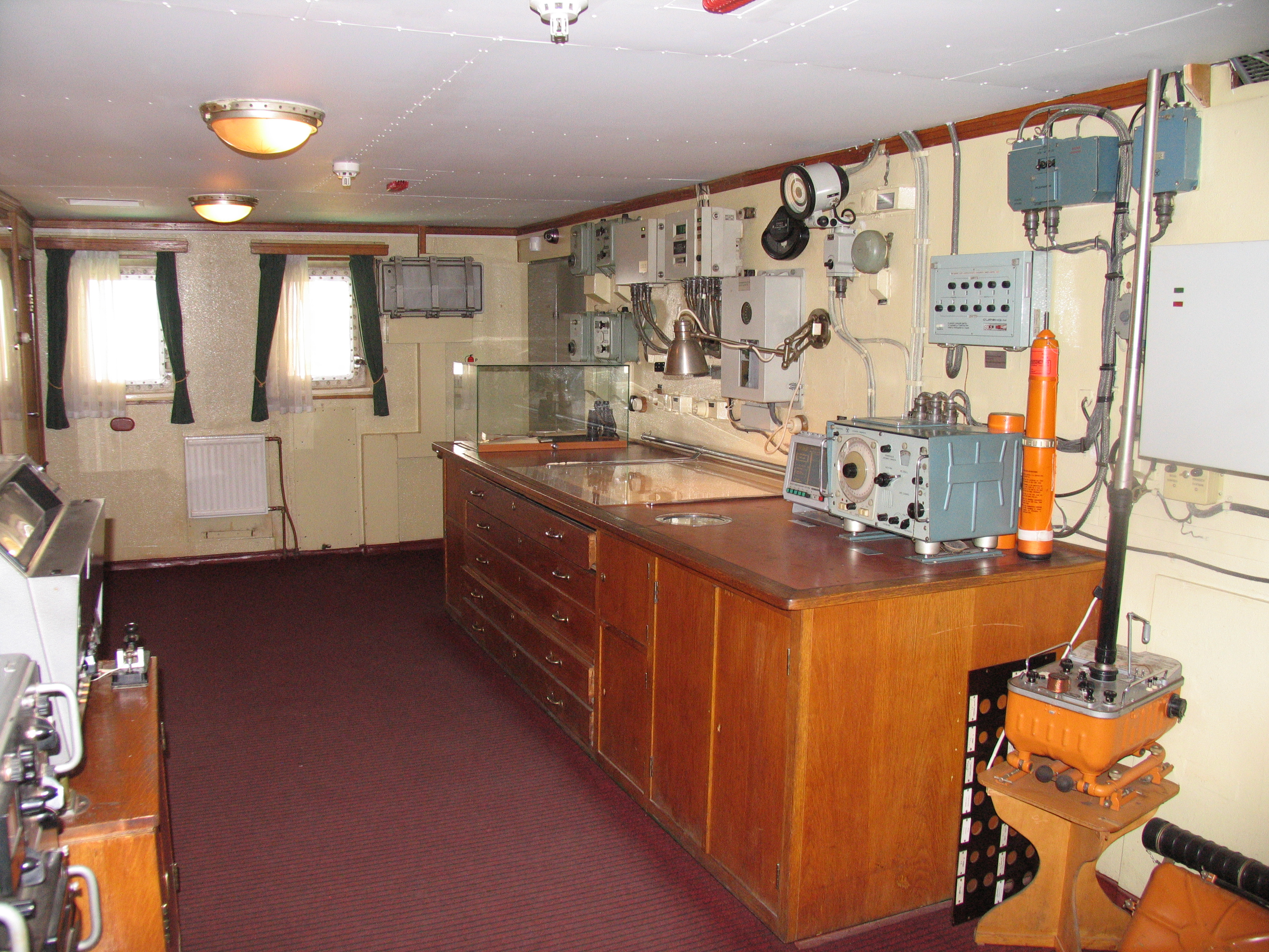 Штурманская рубка ледокола «Красин».